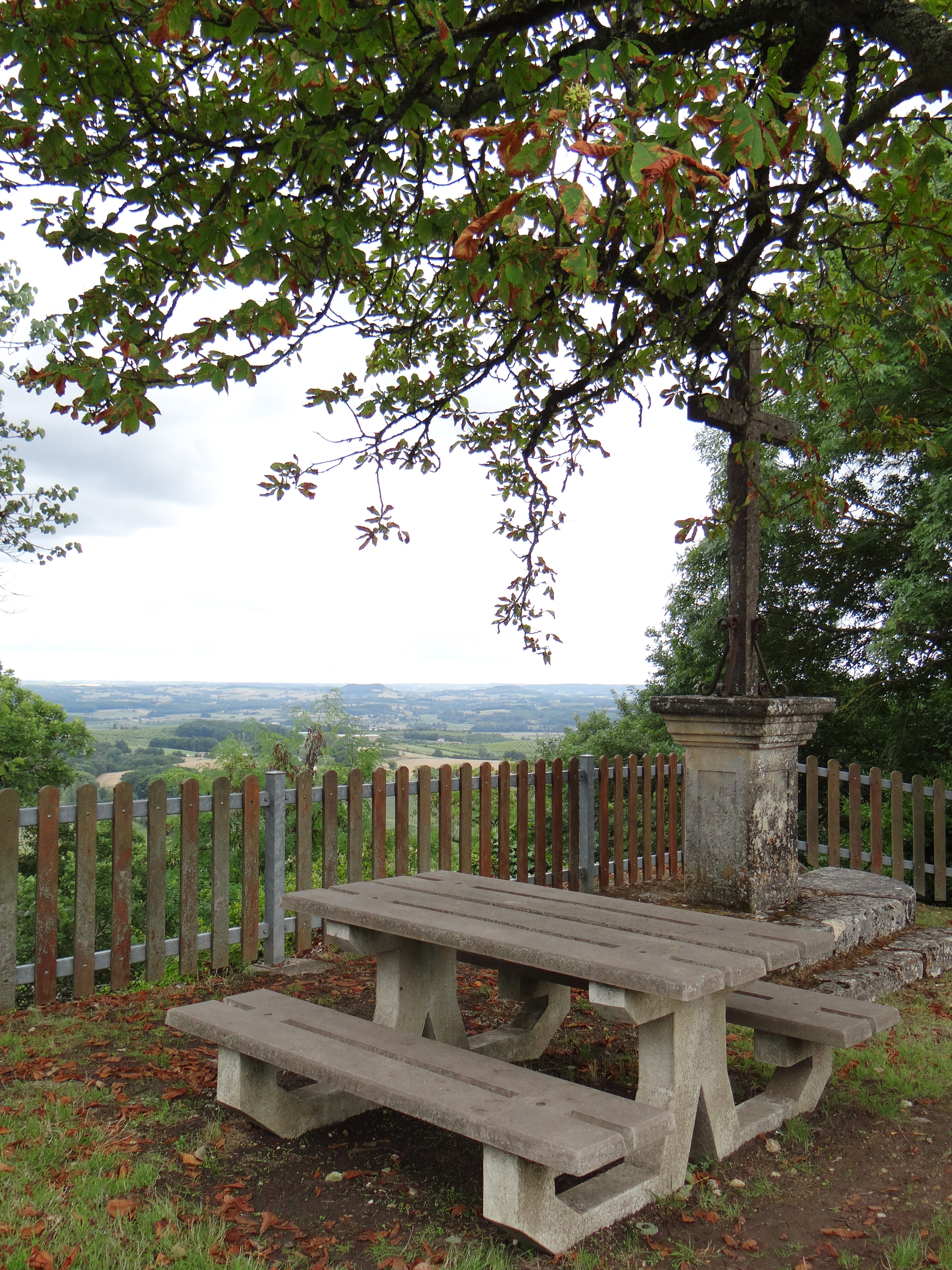 Monségur (Lot-et-Garonne) - Point de vue sur la vallée du Lot